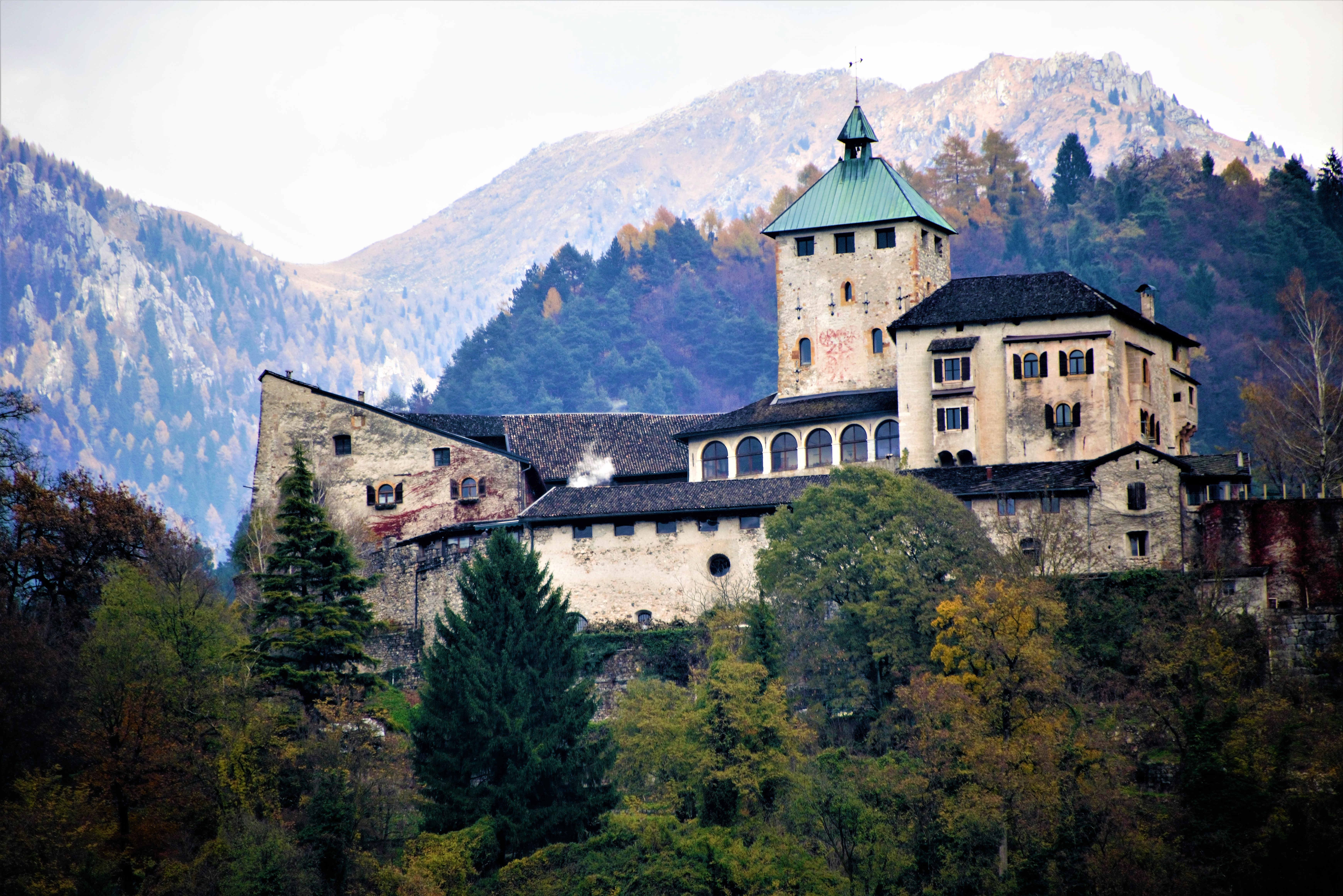 Castel Ivano This is a photo of a monument which is part of cultural heritage of Italy.